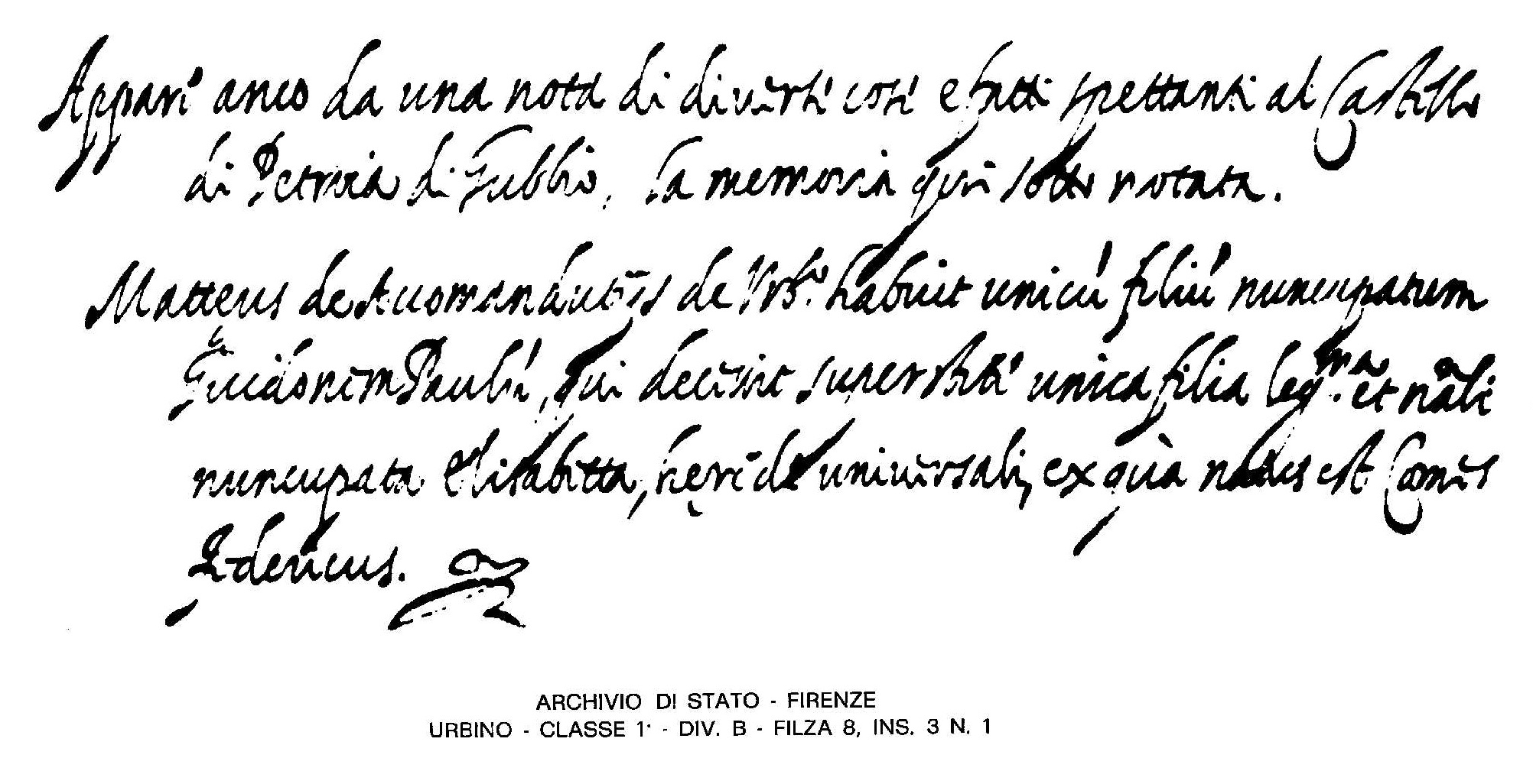 Appare anco da una nota di diverse cose e fatti spettanti al castello di Petroia di Gubbio,la memoria qui sotto notata. Matteus de Accomandutiis habuit unicum filium, noncupatum Guidonem Paulum, qui decessit,superstiti unica filia,legittima et naturali,noncupata Elisabetta,herede universali,ex qua natus est Comes Federicus